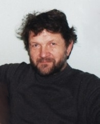 Tiit Madisson